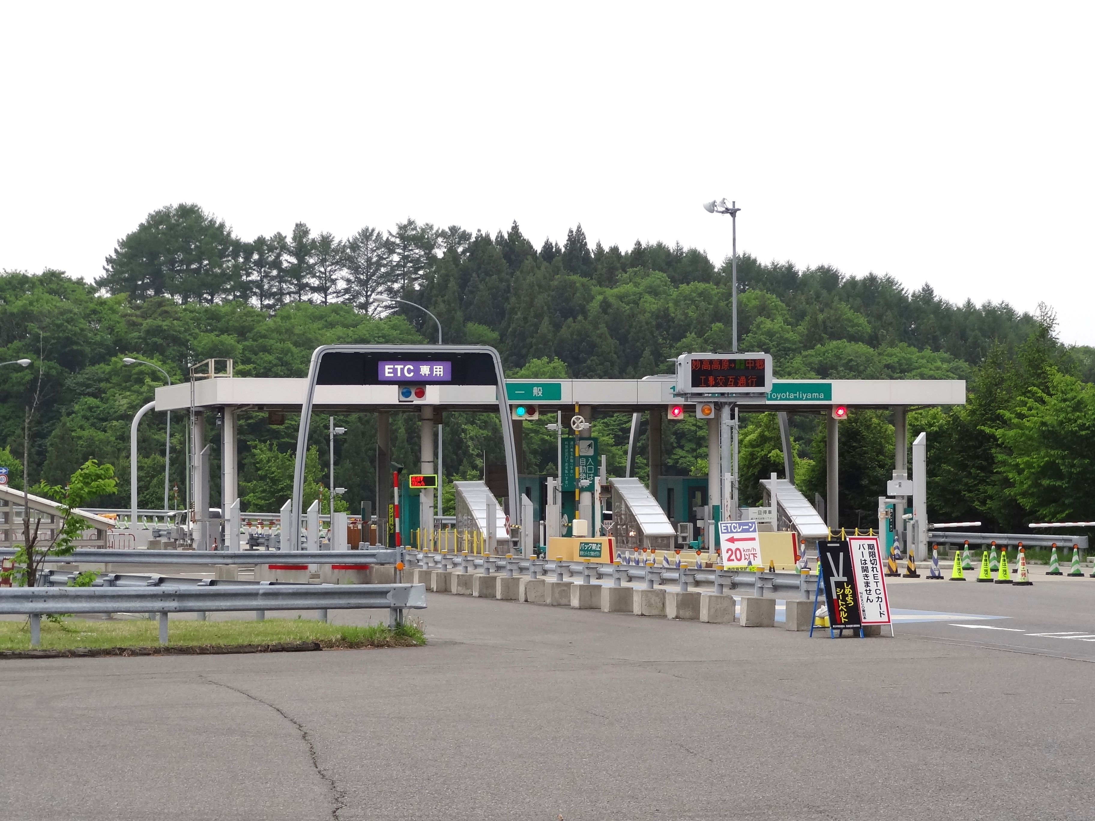 上信越自動車道 豊田飯山インターチェンジ